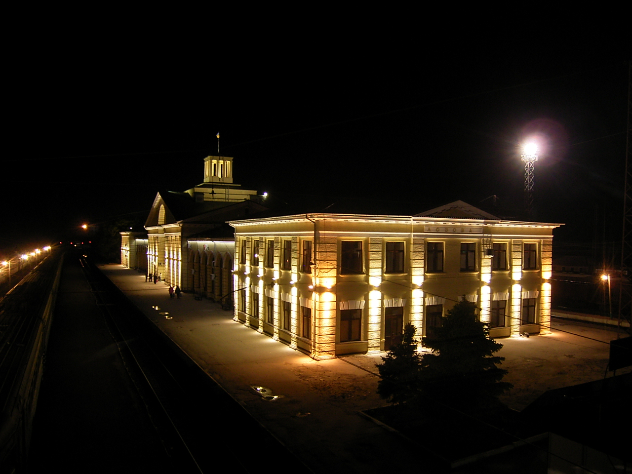 ст.ЛОЗОВАЯ